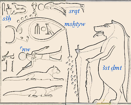 Détails des constellations représentées dans la tombe de Ramsès II dans la vallée des rois